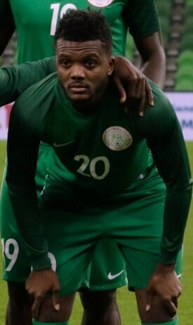 Nigeria national football team